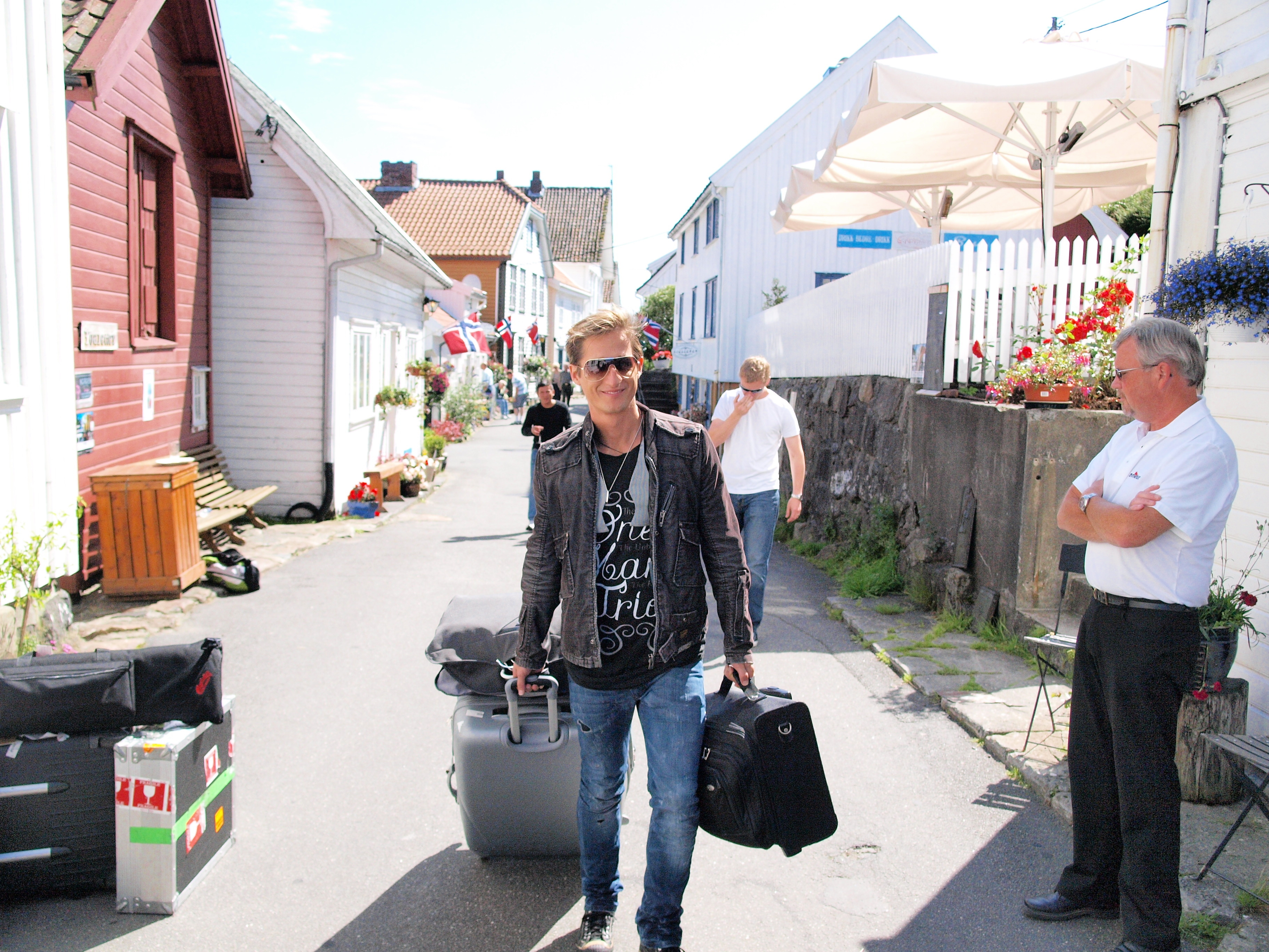 Gaten på Sogndalstrand brukes som resepsjon for Sogndalstrand Kulturhotell.